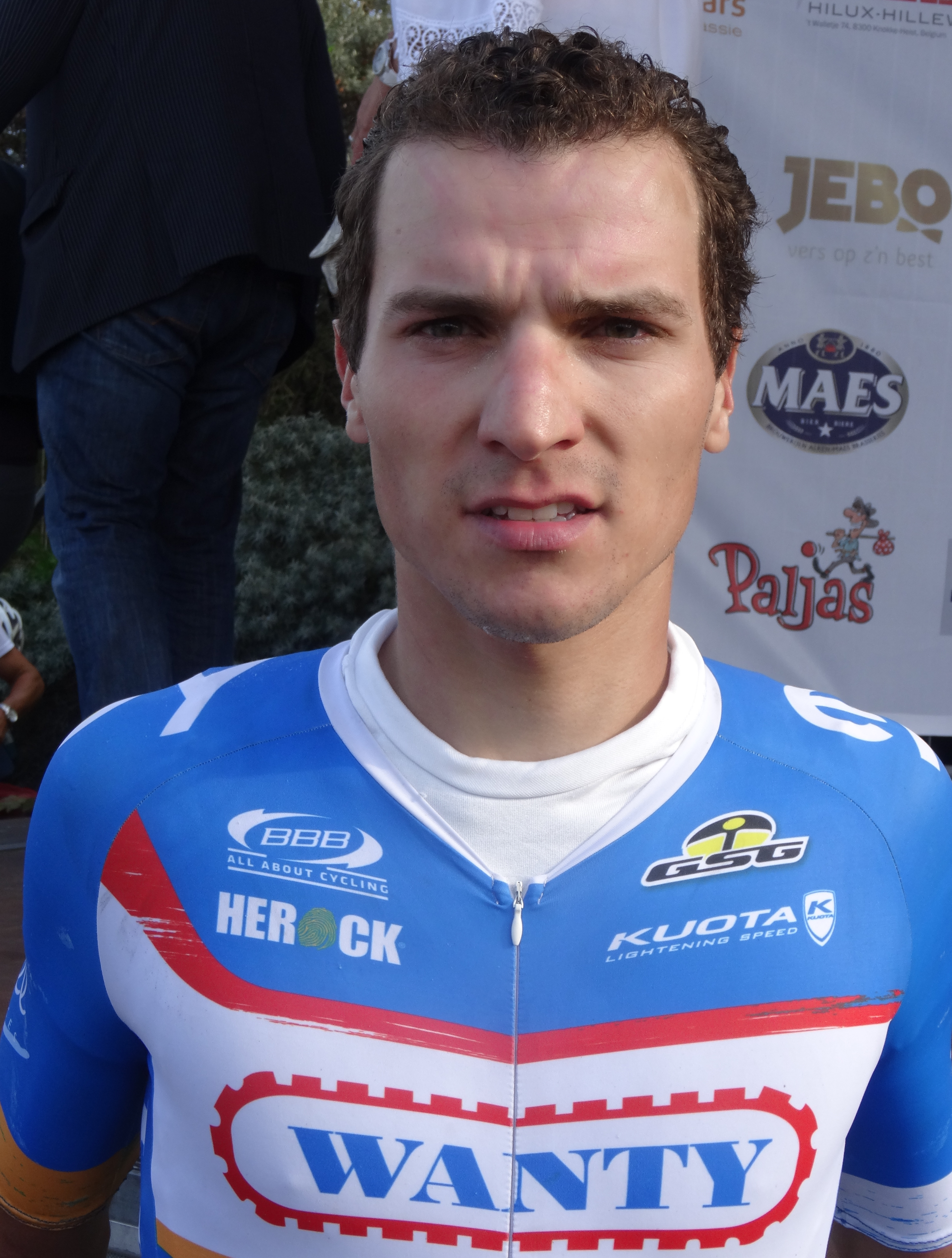 Reportage photographique réalisé le samedi 13 septembre à l'occasion du départ et de l'arrivée de la Flèche côtière 2014 à Heist (Knokke-Heist), Belgique.